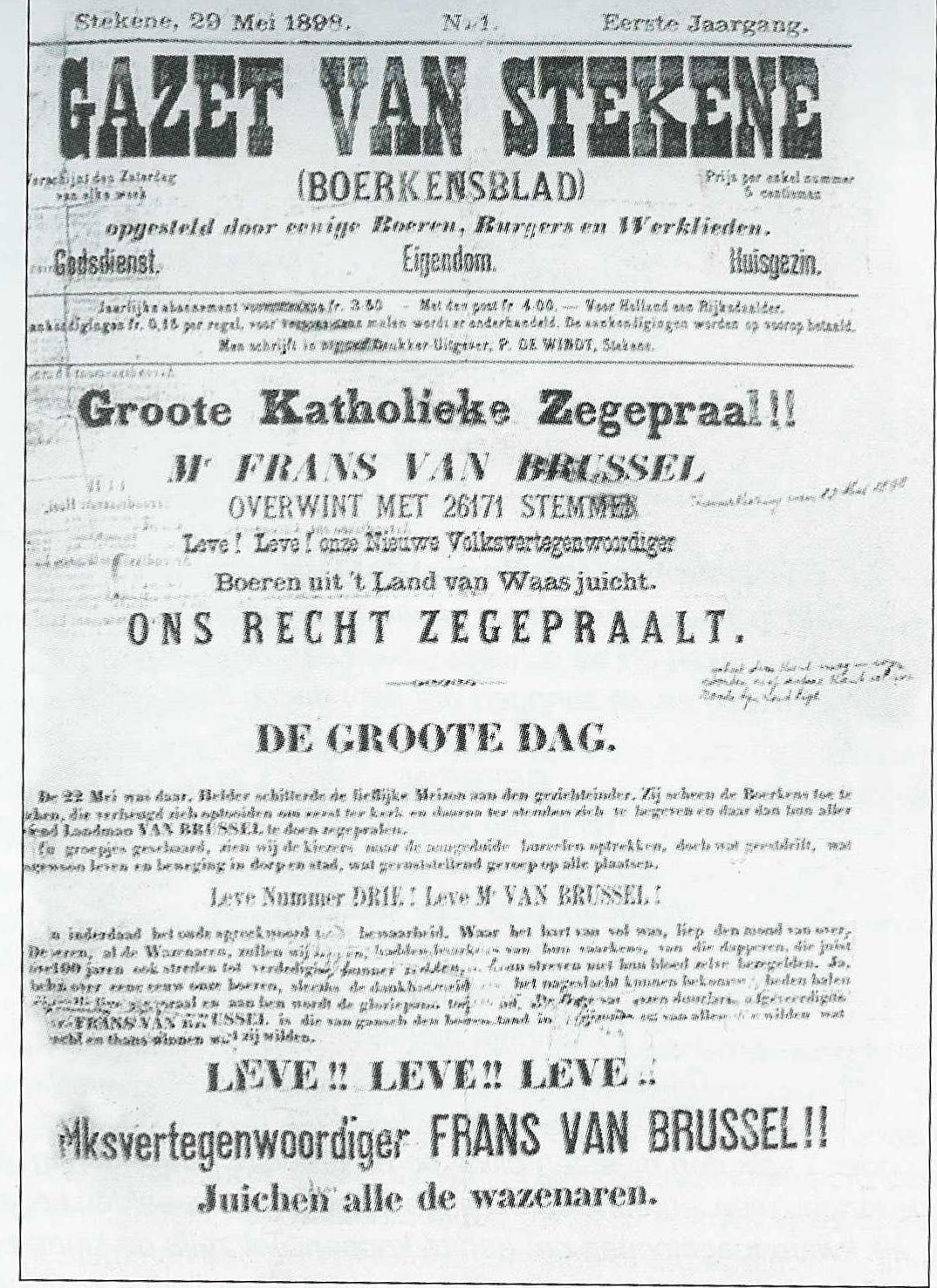 Eerste nummer van de Gazet van Stekene - Stekene - Oost-Vlaanderen - Vlaanderen - België